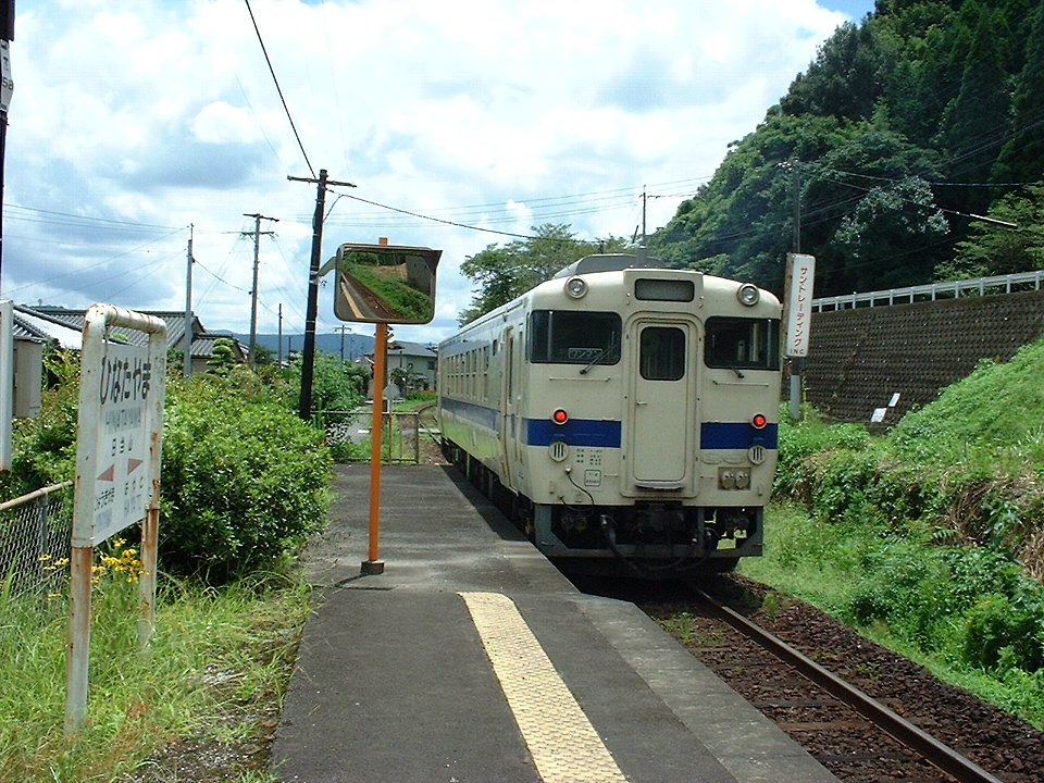 日当山駅ホーム キハ40が発車